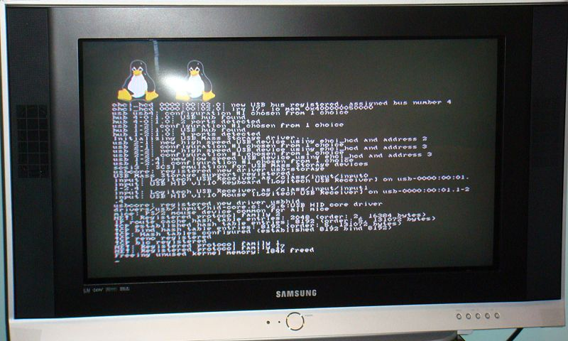 Yellow Dog Linux arrancando en una PS3.